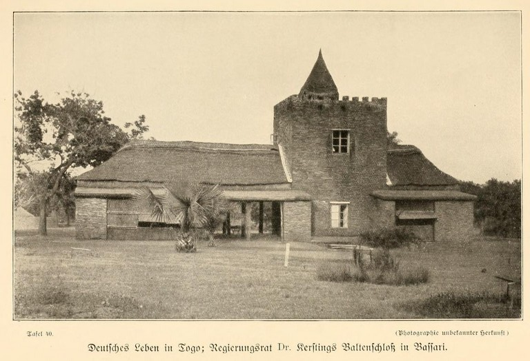 “Das Schloß von Regierungsrat Dr. Kersting in Bassari” - from Expeditionsbericht der Zweiten Deutschen Inner-Afrika-Expedition (1907-09) Auf dem wege nach Atlantis.